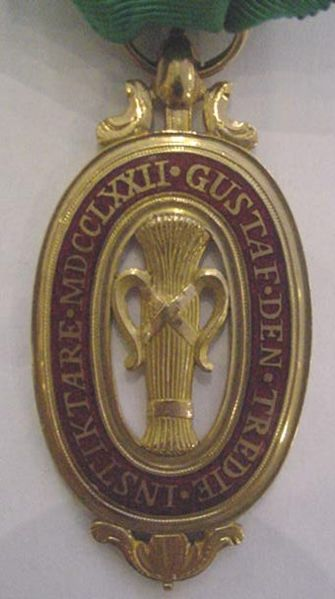 Vasaorde as it looked before 1860 Sweden